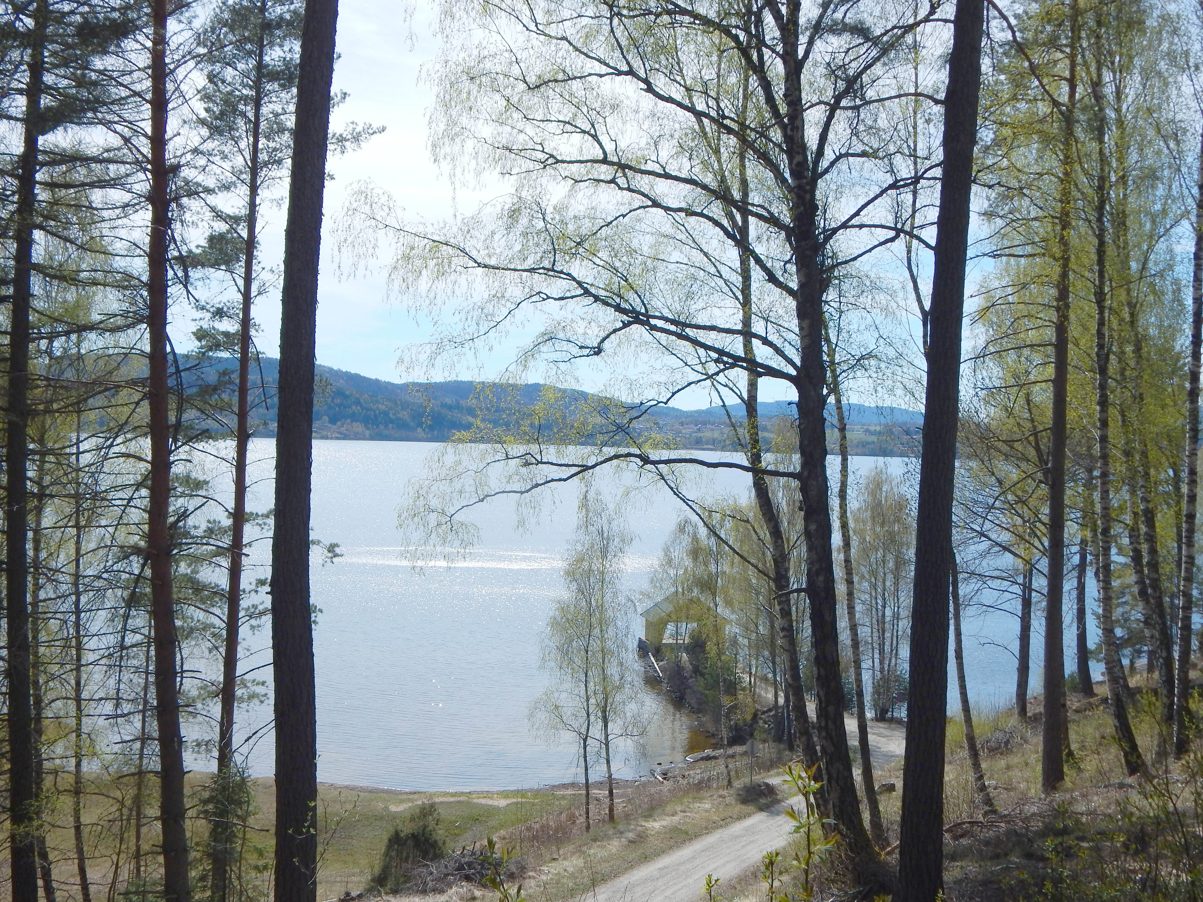 Valebø brygge sett fra kirkegården